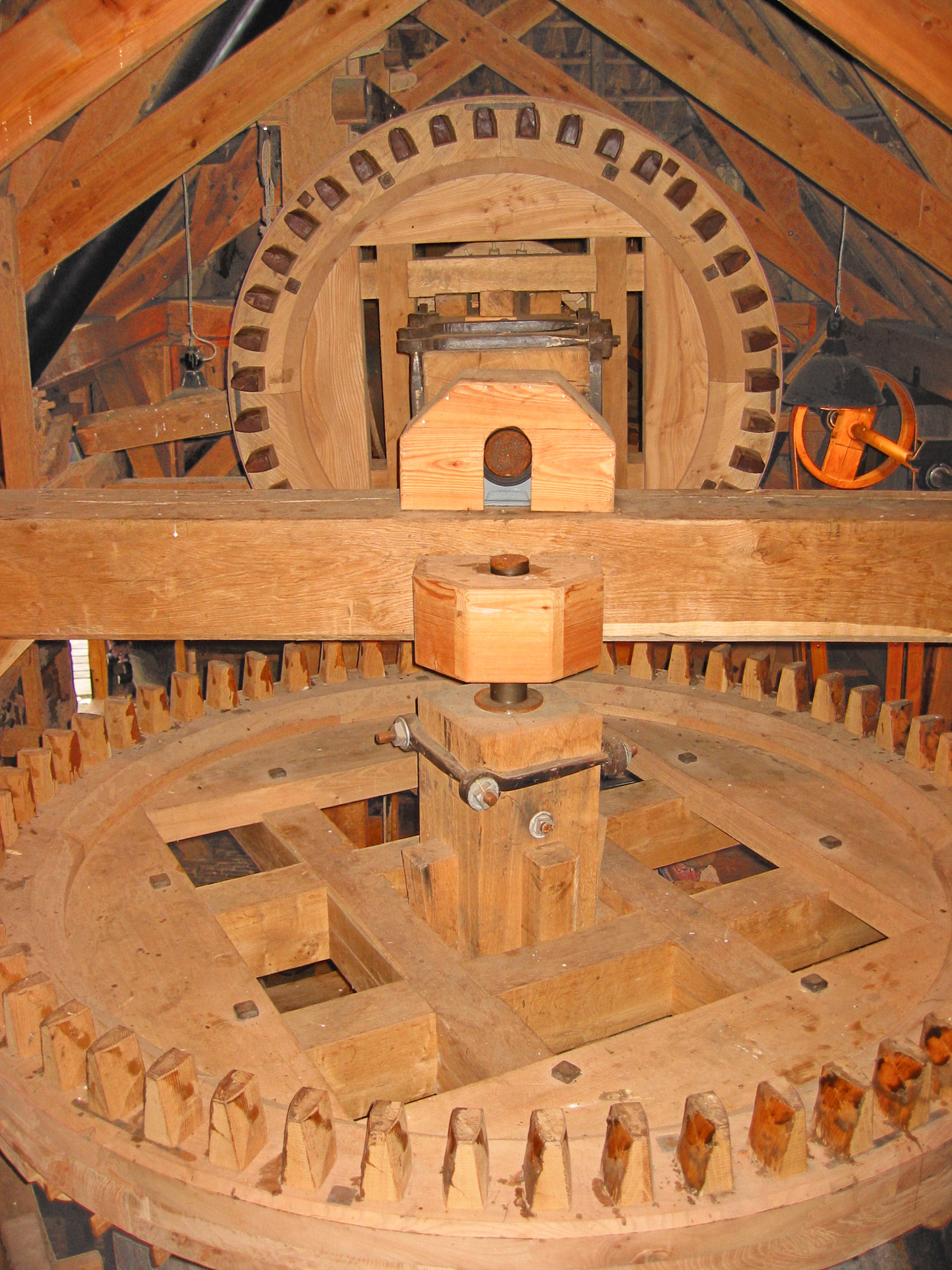 Collse Watermolen, steenwiel, Eindhoven-Tongelre, the Netherlands